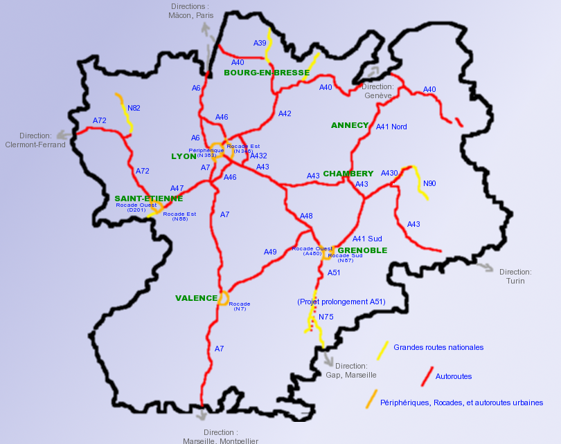 Artères autoroutières de la région Rhône-Alpes